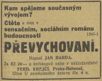 Jan Burda: Převychovaní (inzerát 1931)